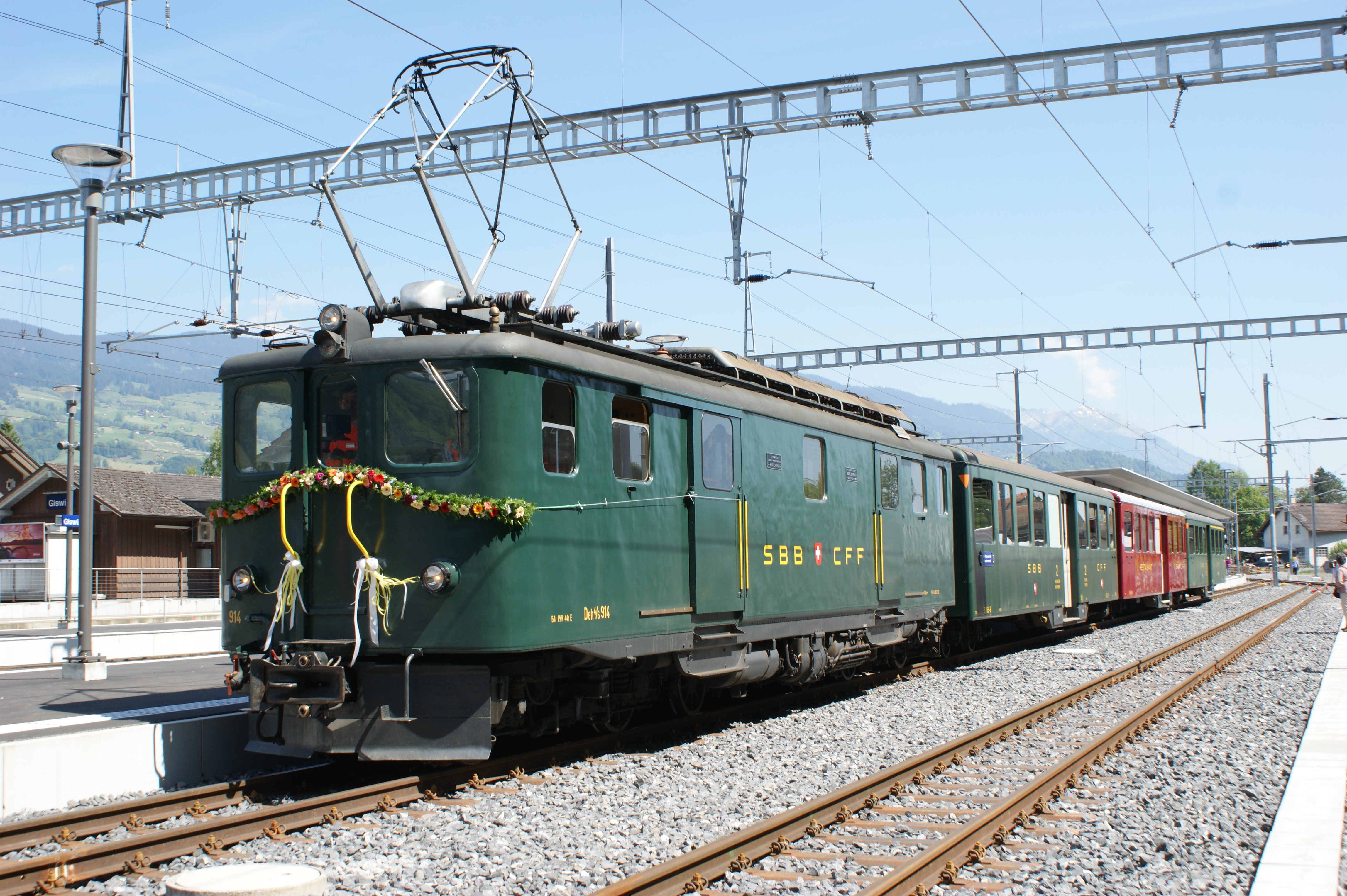 Brünigbahnzug aus der Elektrifikationszeit anlässlich des 125-jährigen Jubiläums der Strecke Alpnachstad–Brienz